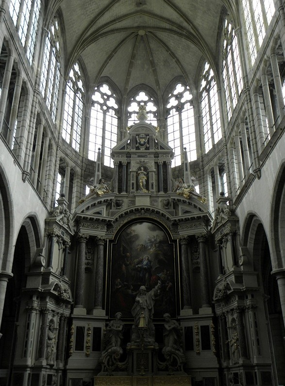 Chœur de l'abbatiale Saint-Sauveur de Redon (35). .